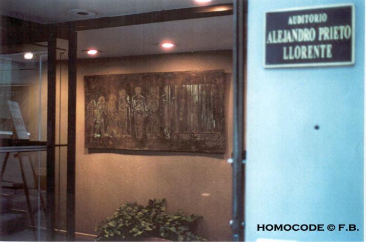 "Homocode" de Frédéric Berthelot, en el Auditorio de la EBC en México DF